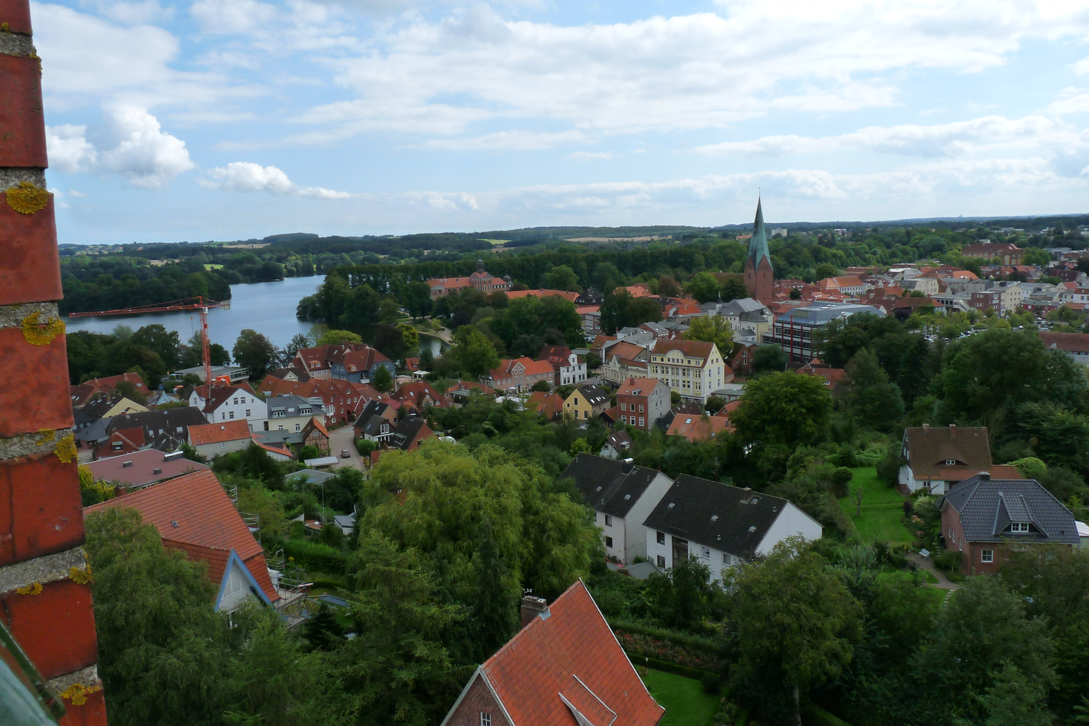 Eutin, Blick vom Wasserturm